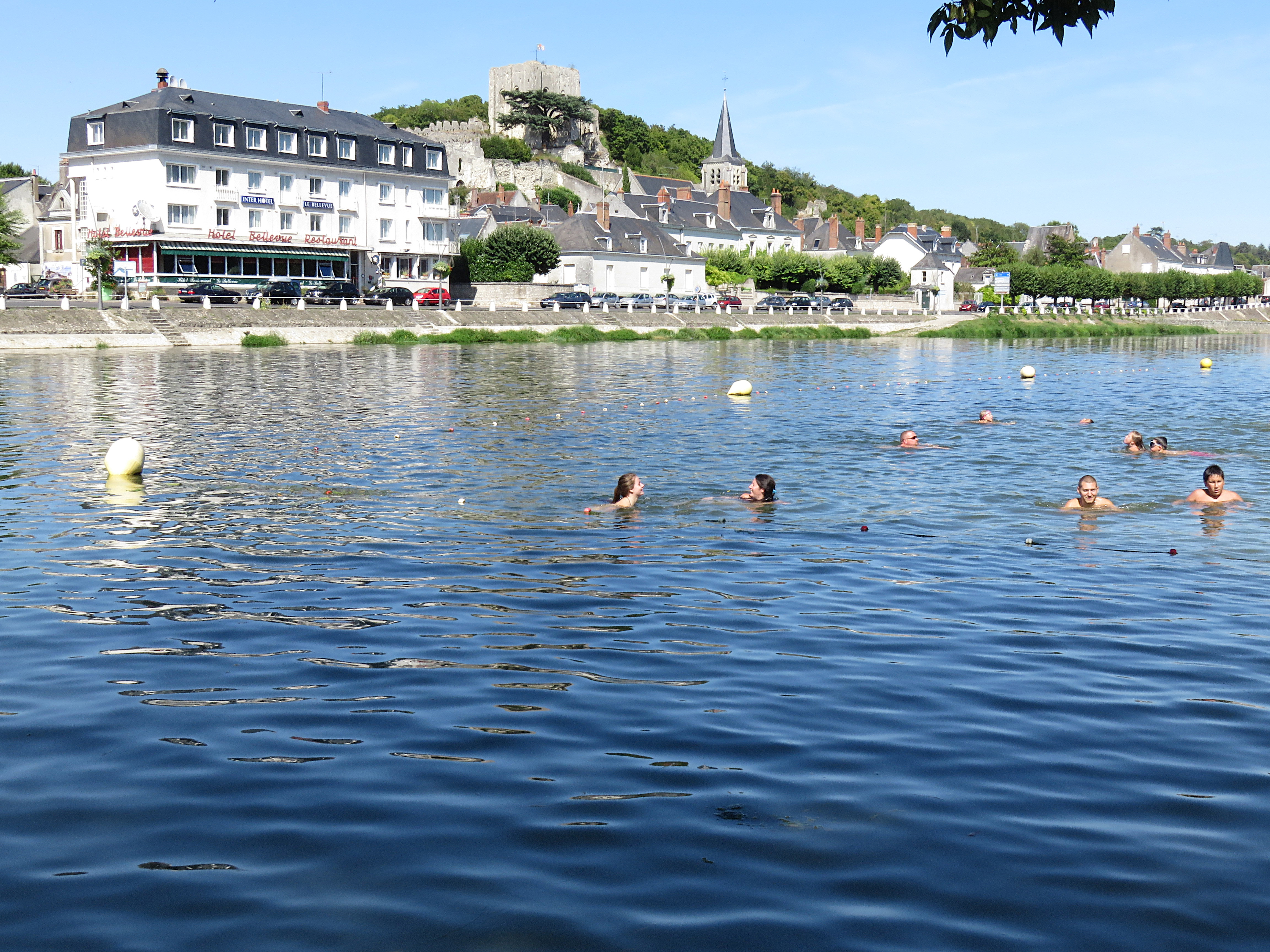 Les quais de Montrichard vus de l'autre rive du Cher coté plage.